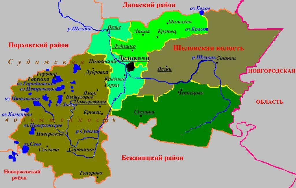 Дедовичский район 2010